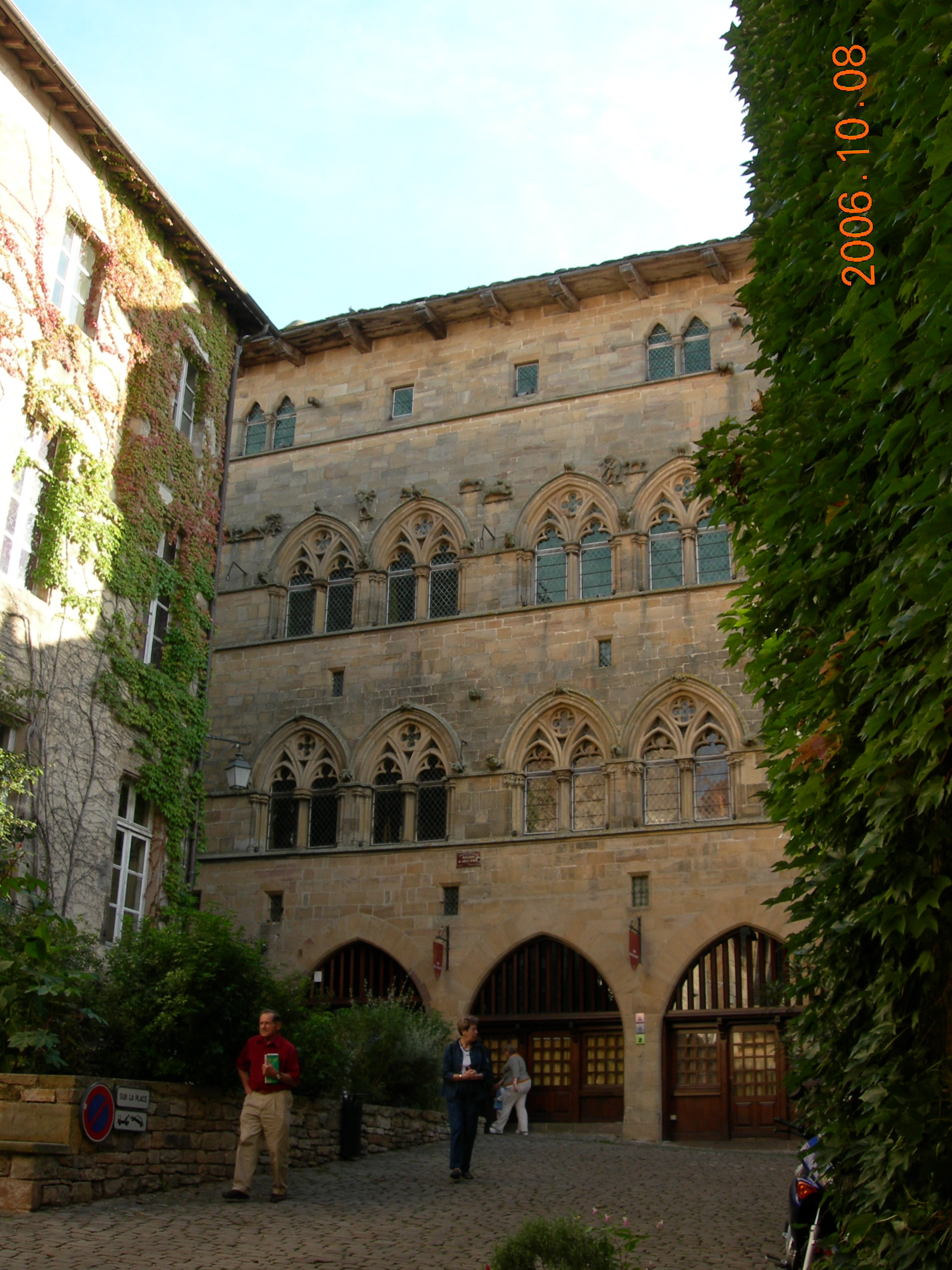 Cordes-sur-Ciel département du Tarn en France, façade de la "Maison du Grand Veneur"